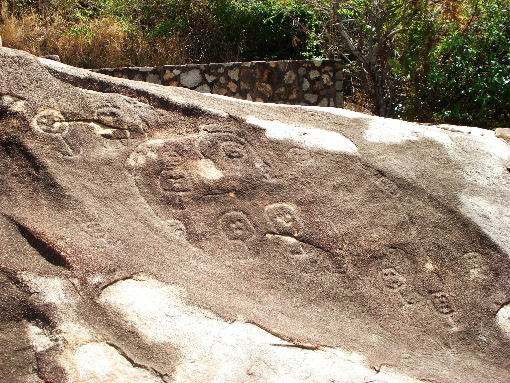 Elemento Nº 2 de la zona arqueológica de Palma Sola en Acapulco, Guerrero, México.